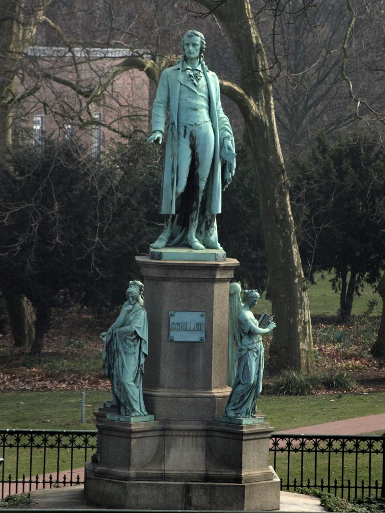 Schiller-Denkmal in Hamburg, Dammtordamm, Foto 2014